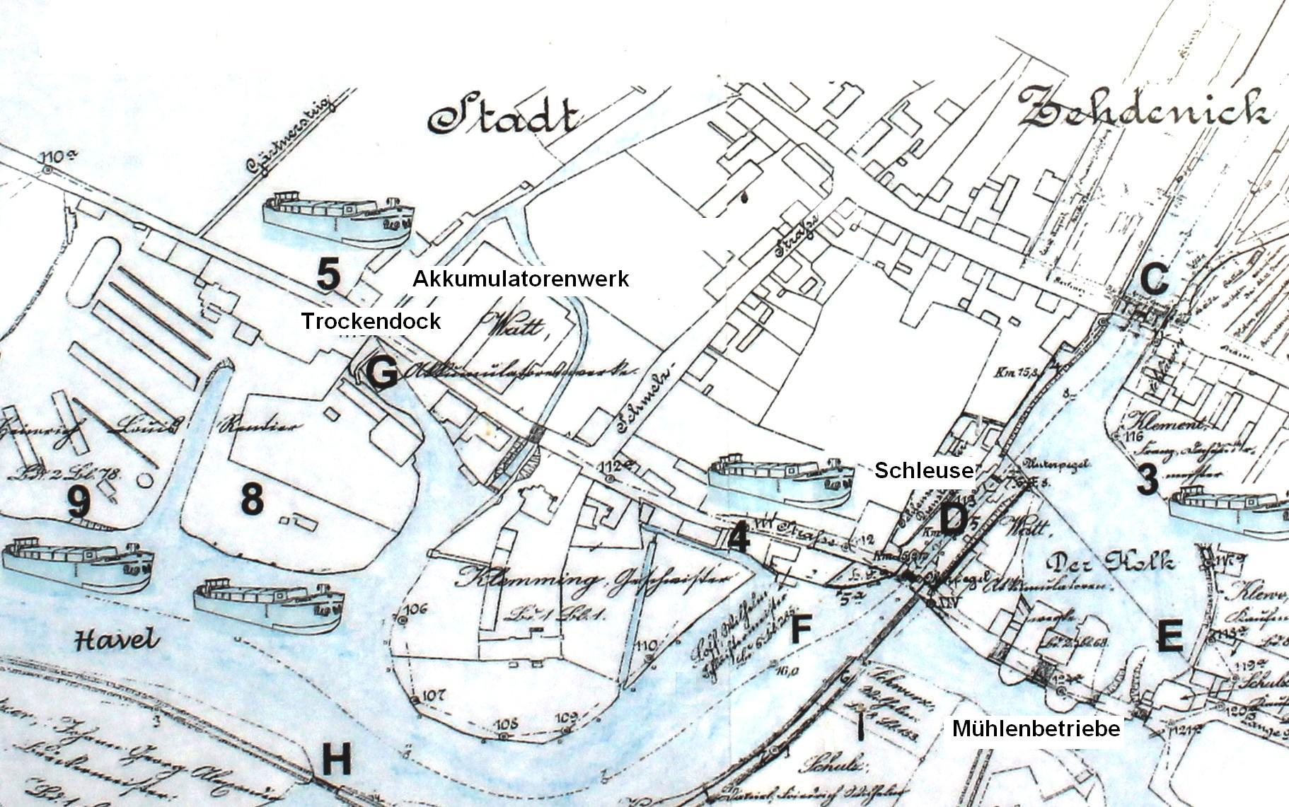 Plan von Zehdenick um die Jahrhundertwende